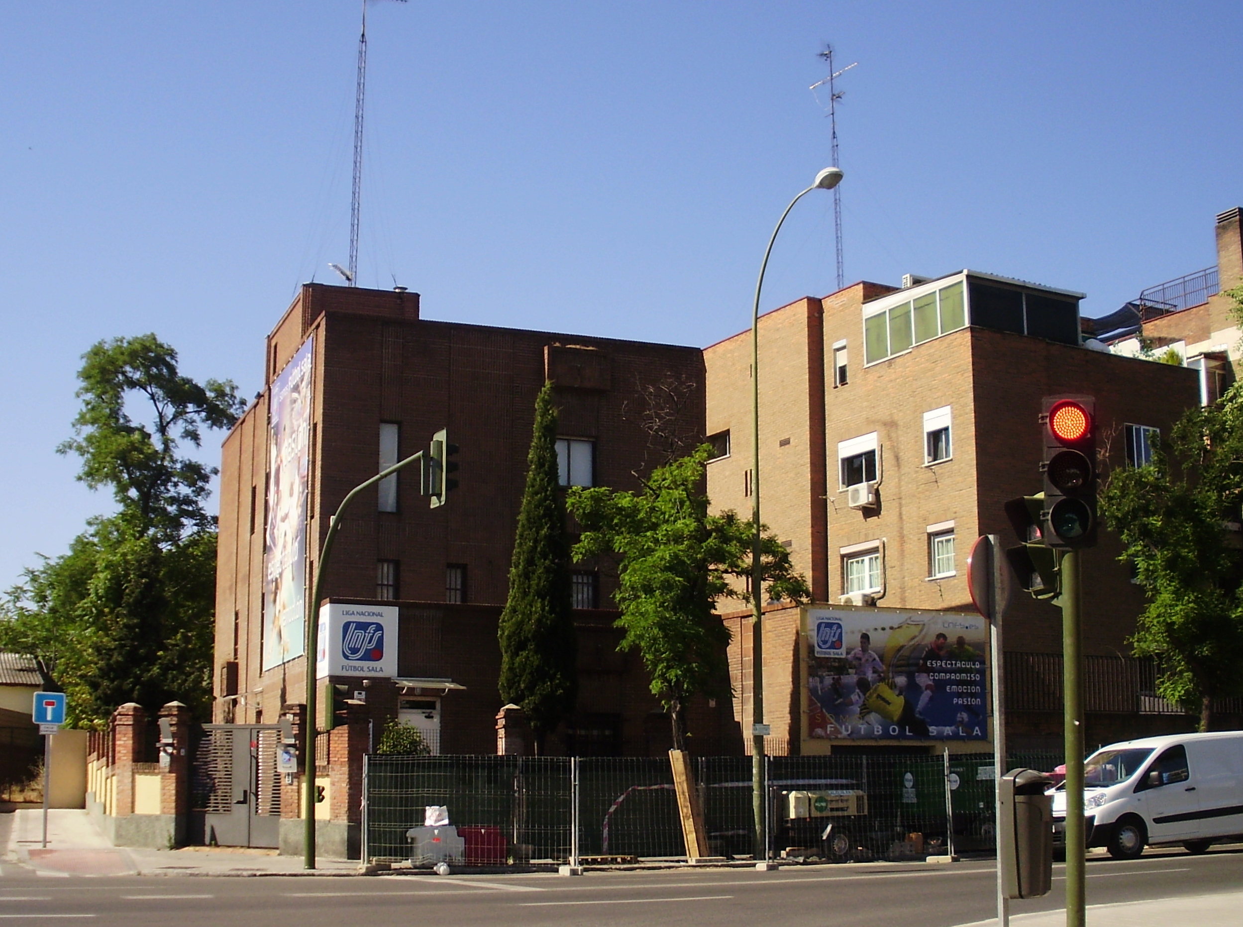 Sede de la LNFS, calle Mateo Inurria 26, Madrid, España